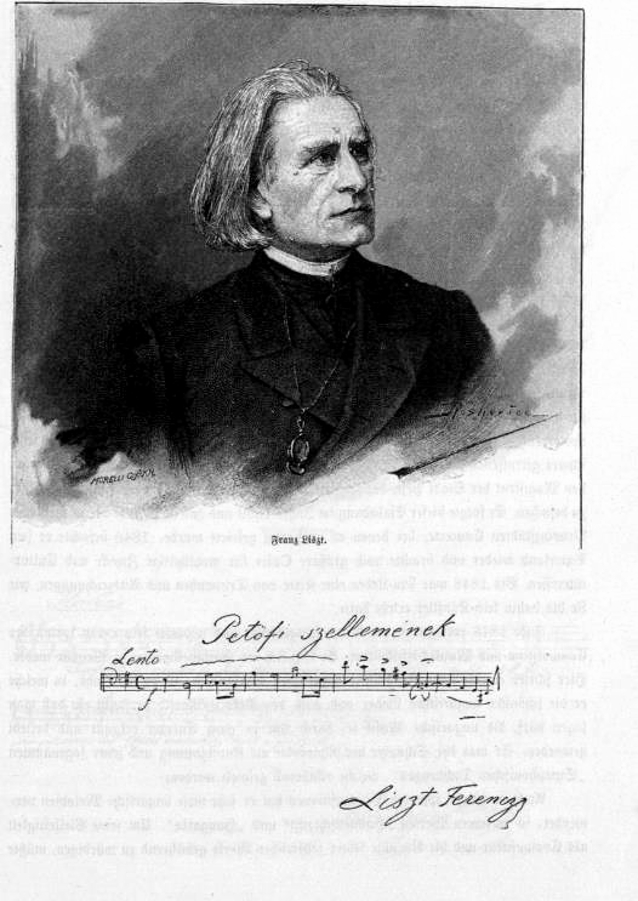 Liszt ferenc portréja, kézírása és szignója